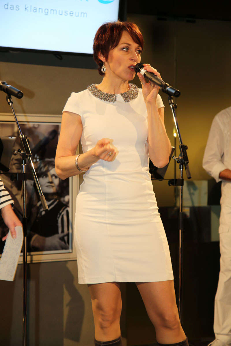 Soriat.Bettina-150401-5967